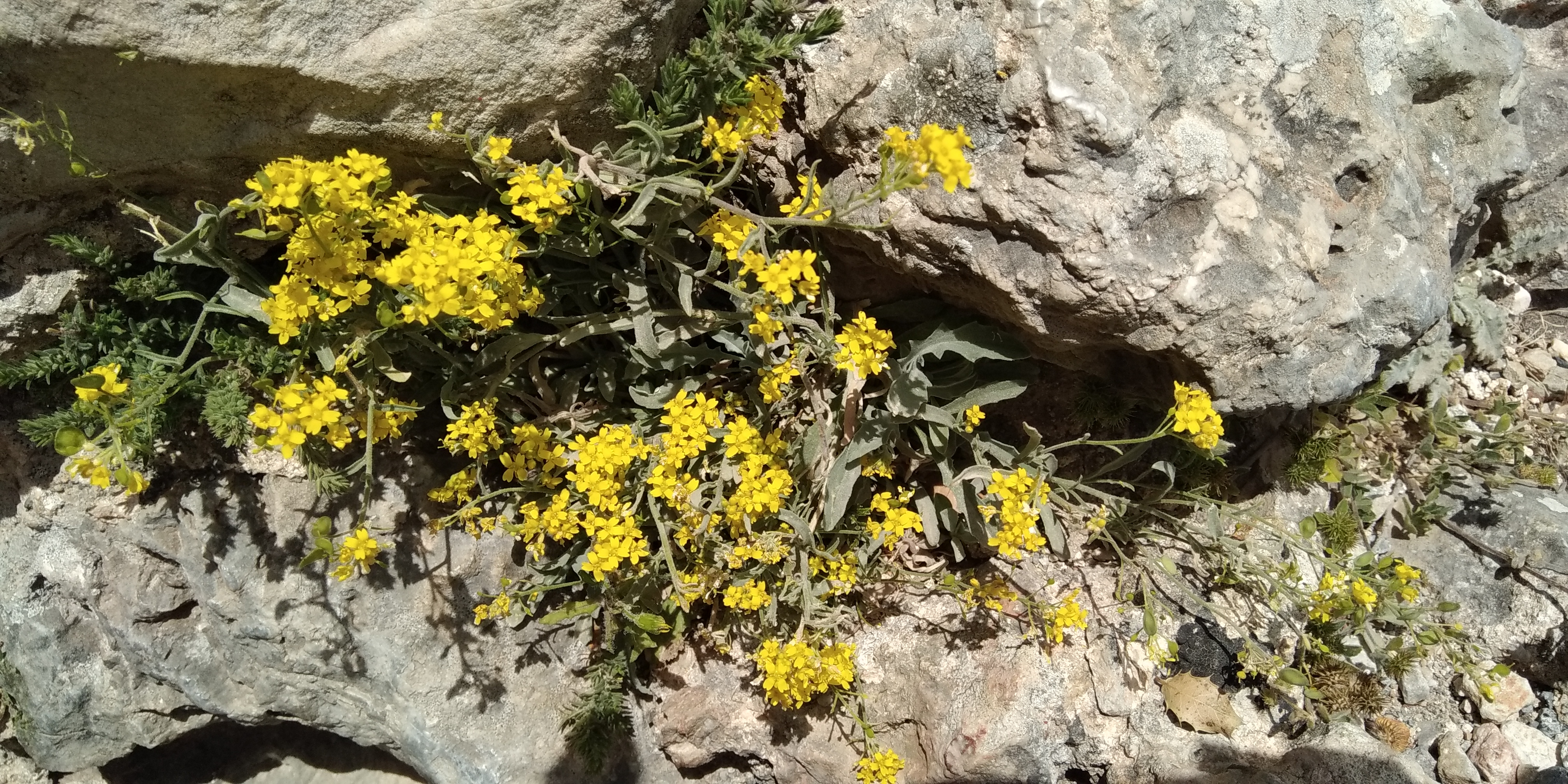 Aurinia saxatilis à Mistra